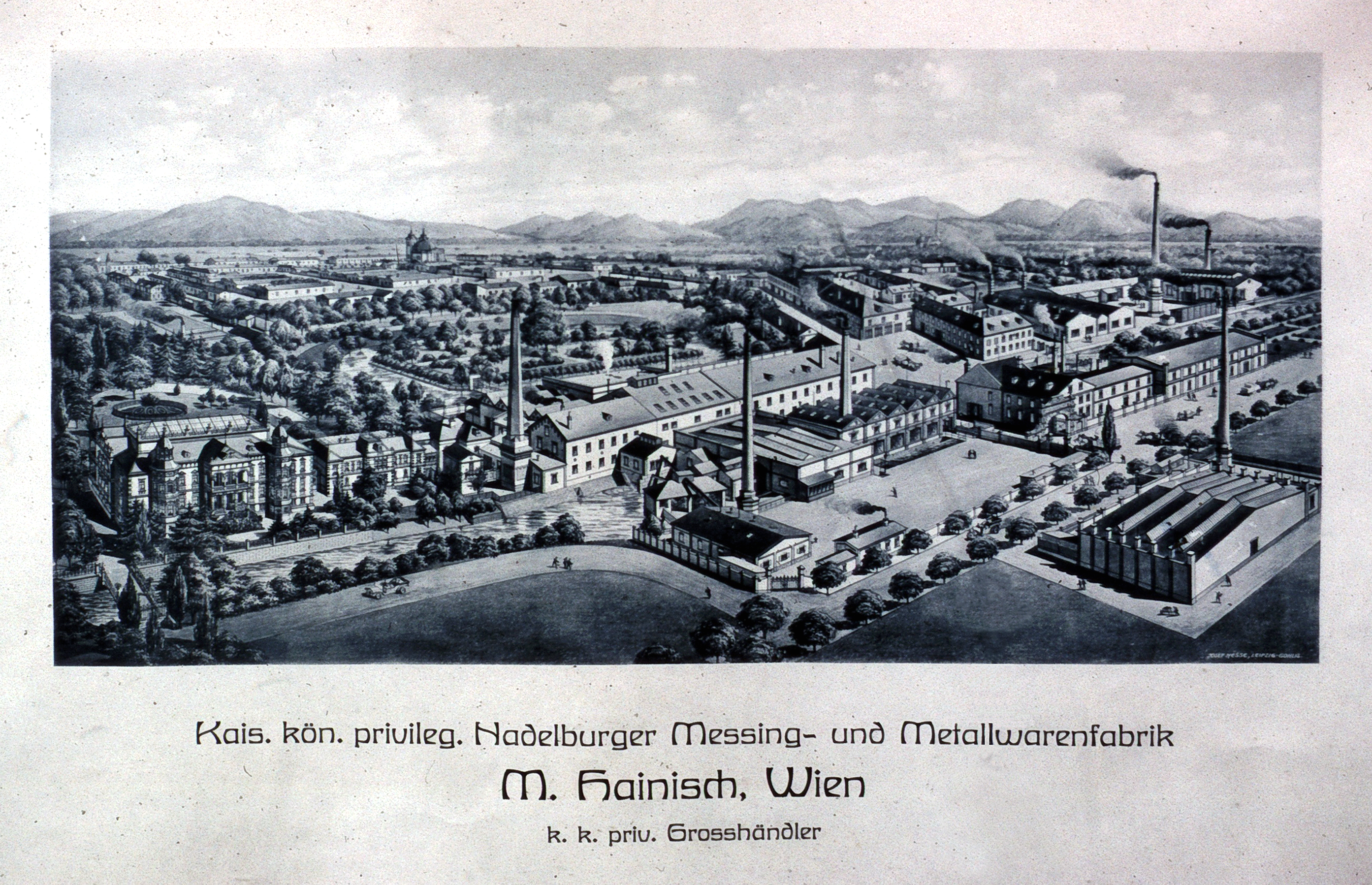 Lichtenwörth, Niederösterreich, Industriesiedlung Nadelburg